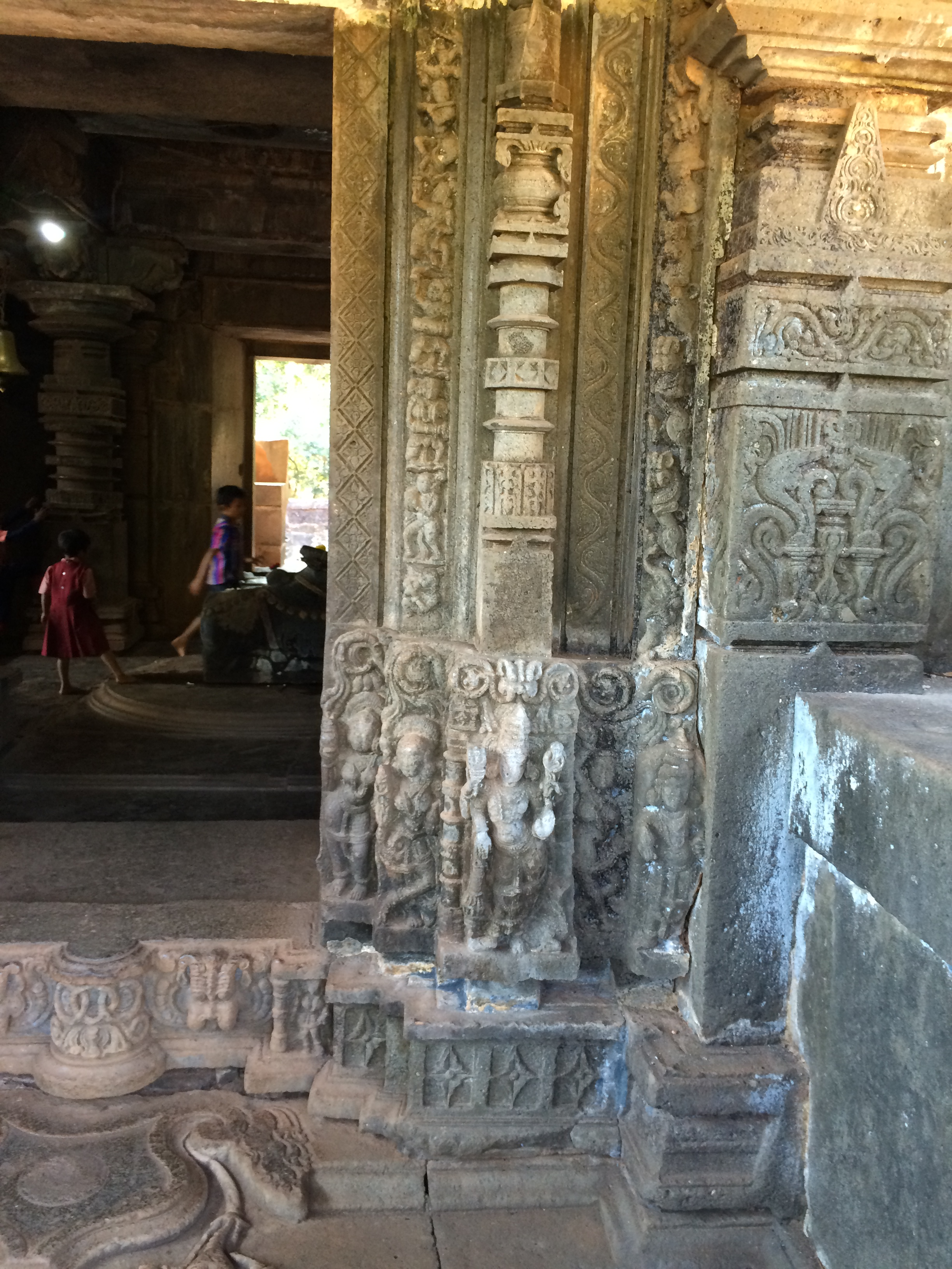 कर्णेश्वर मंदिराच्या एका दारावरील शिल्पे